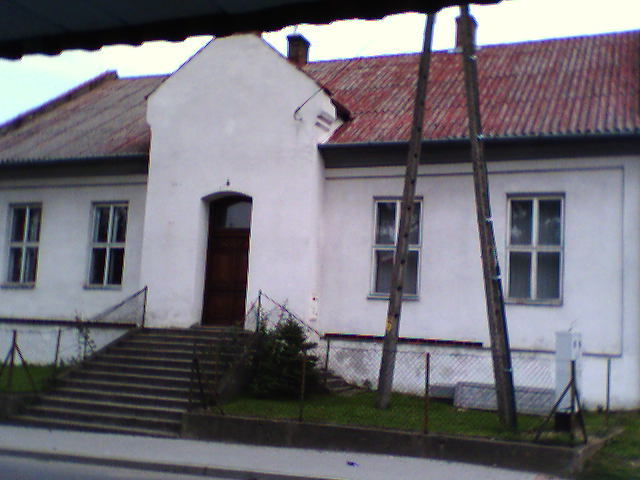 Stara Szkoła w GR.